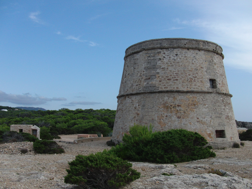 Piratenturm von Cala Conta, Ibiza;07.11